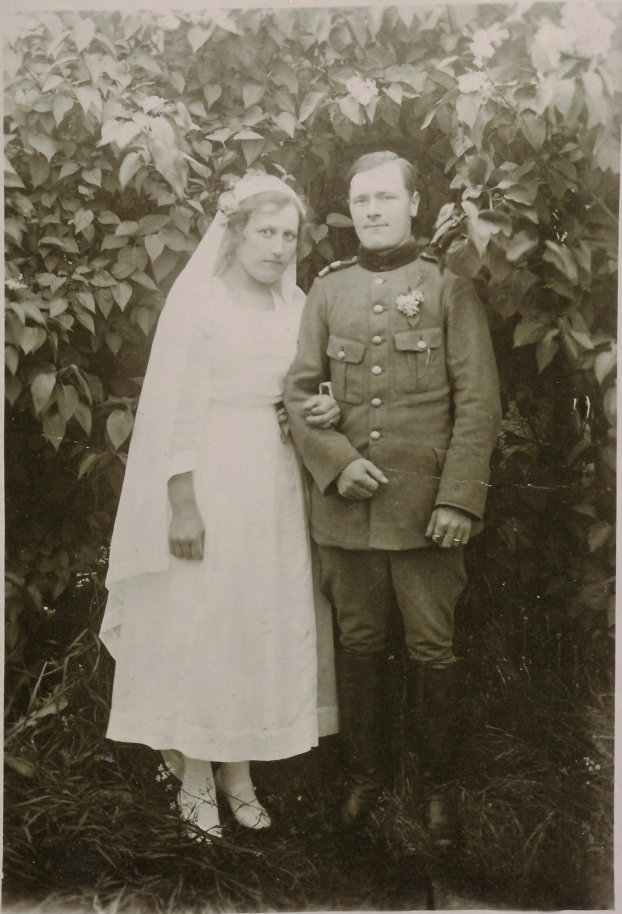 Jääkäri Paavo Haanpää ja hänen vaimonsa Suoma Haanpää (o.s. Santavuori).